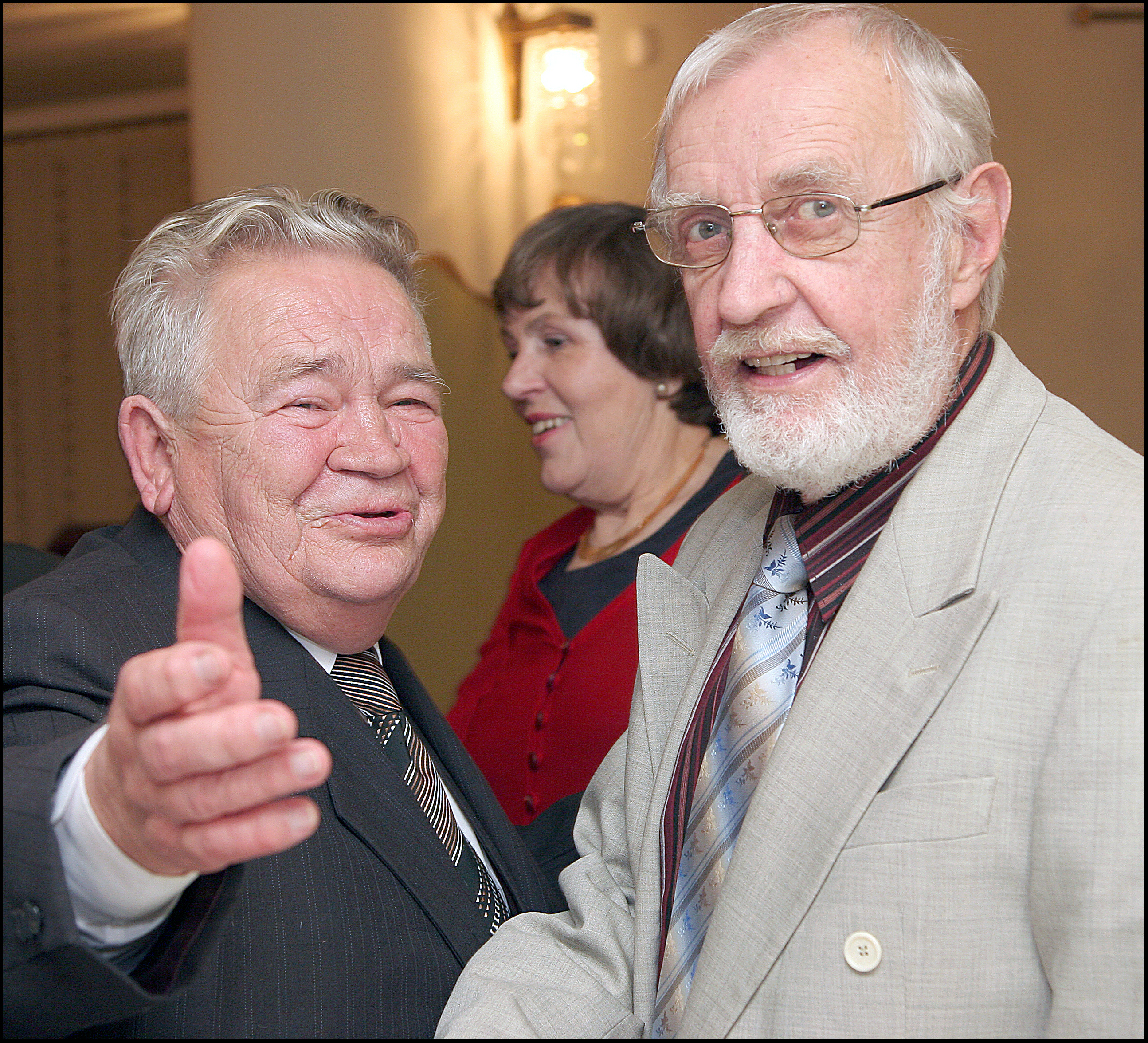 Jaanus Orgulas ja Aarne Üksküla 2007. aastal